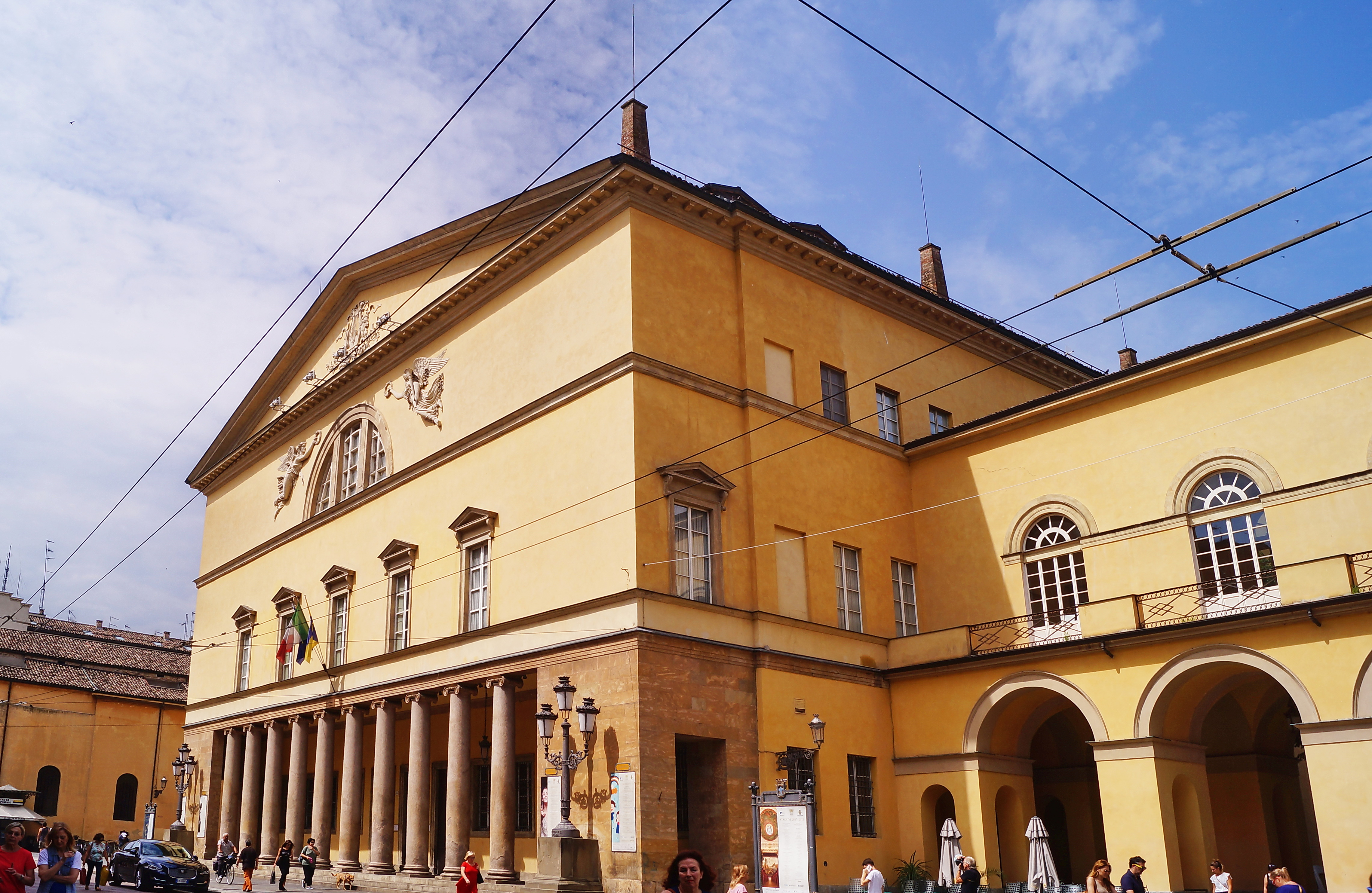 Teatro Regio (Parma) This is a photo of a monument which is part of cultural heritage of Italy.